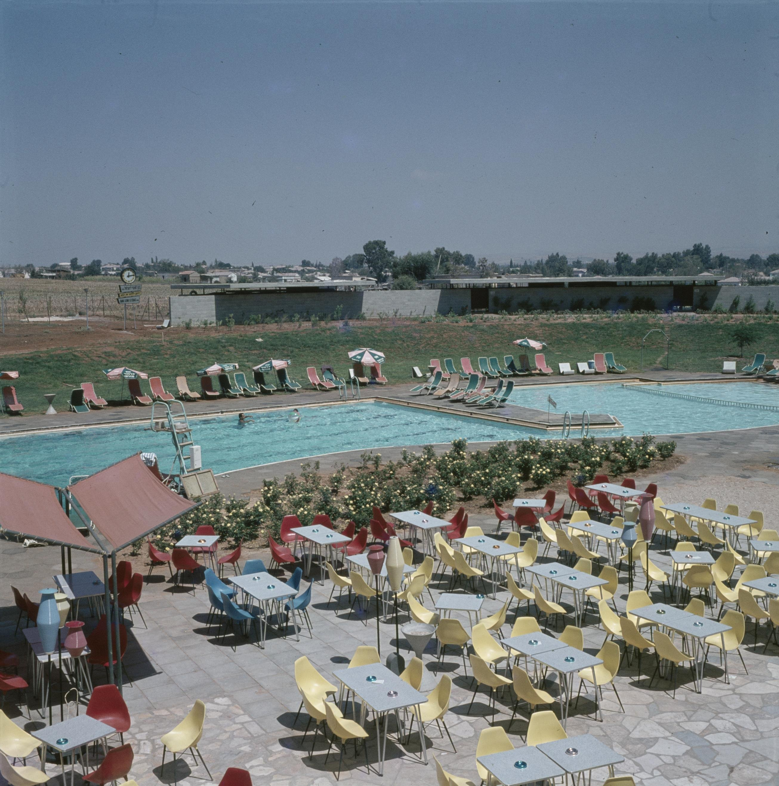 Kirjat Gat. Hotel Avia: gezicht op het terras met tafels en stoelen in pasteltinten en het openluchtzwembad.